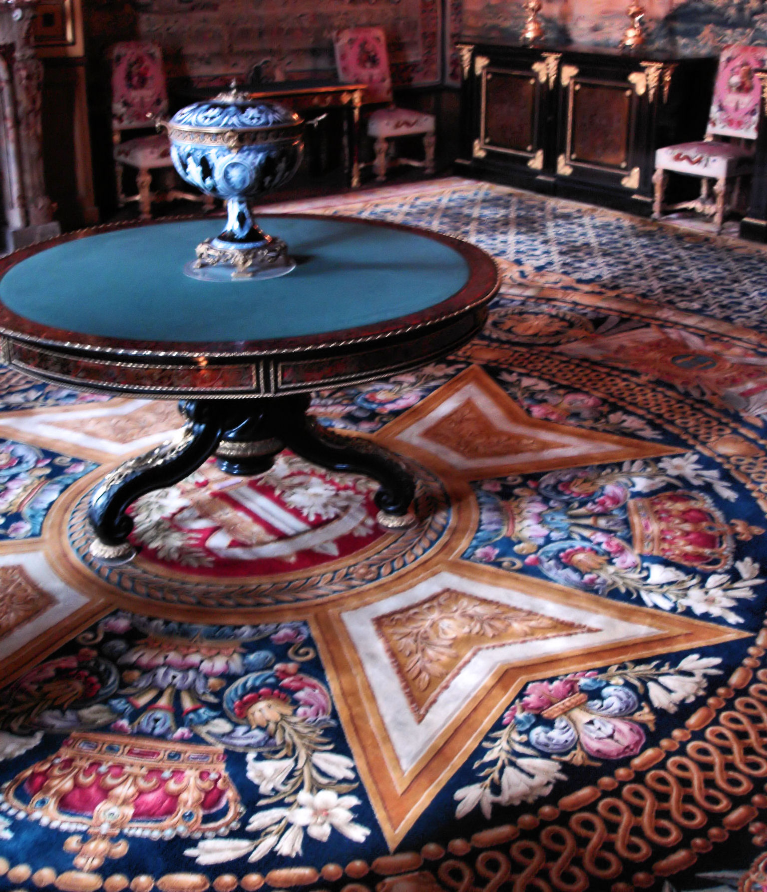 Der Tapisseriesalon im Schloss Fontainebleau